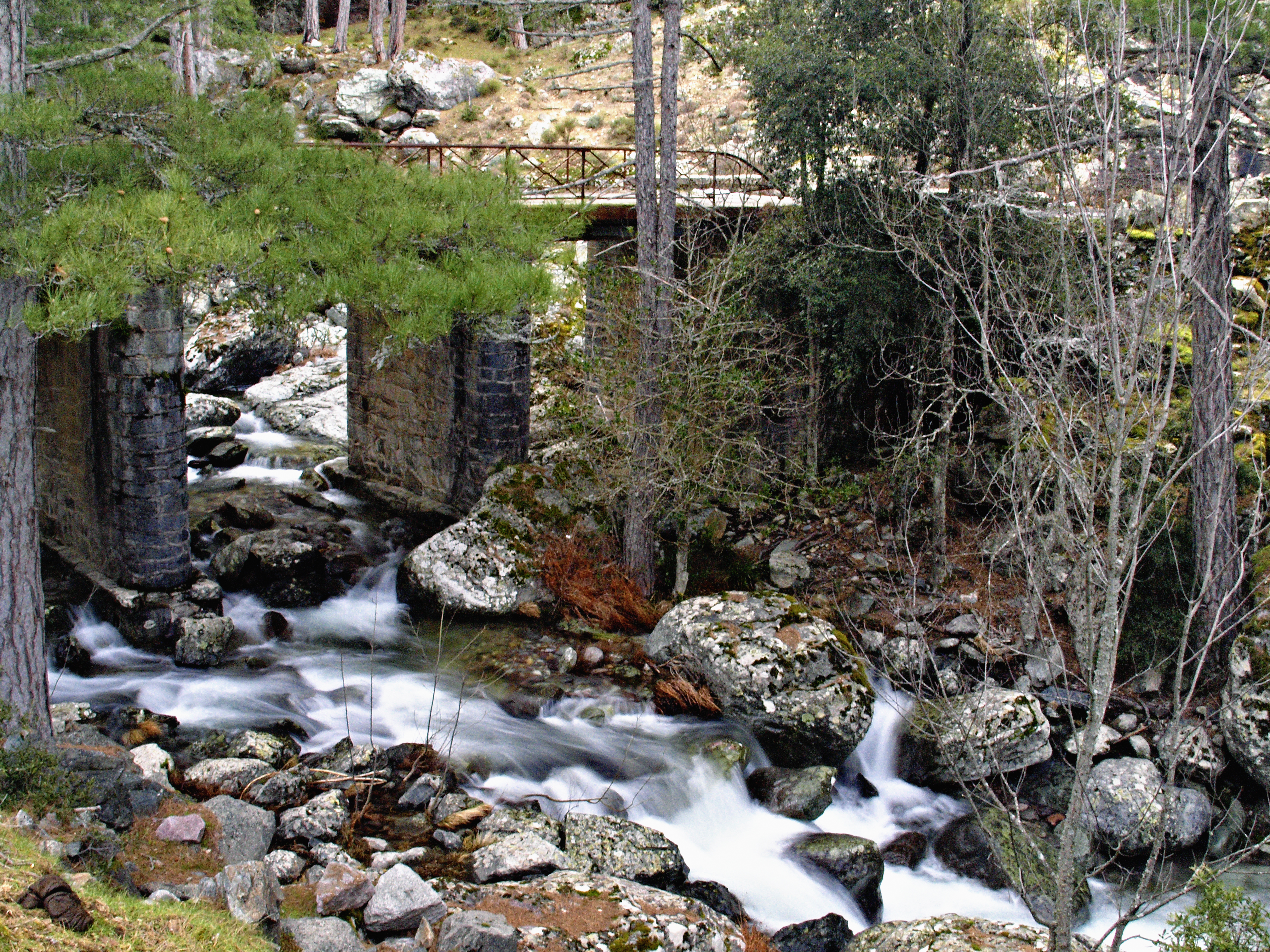 Olmi-Cappella (Corsica) - Pont D963 sur la rivière Melaja